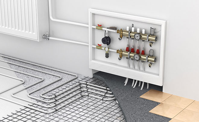 Funzionamento impianto riscaldamento a pavimento